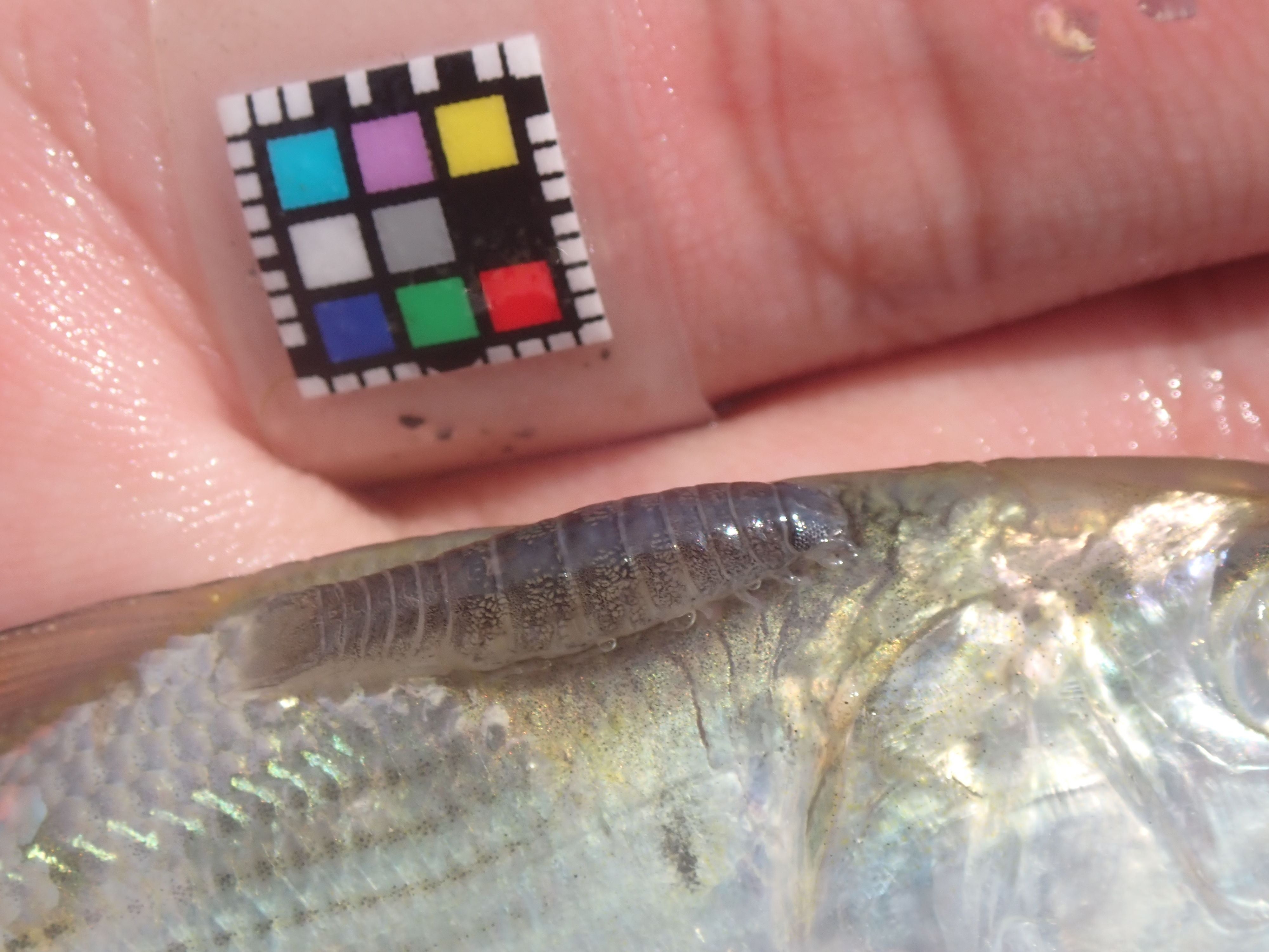 コノシロの寄生したサッパヤドリムシ 詳細